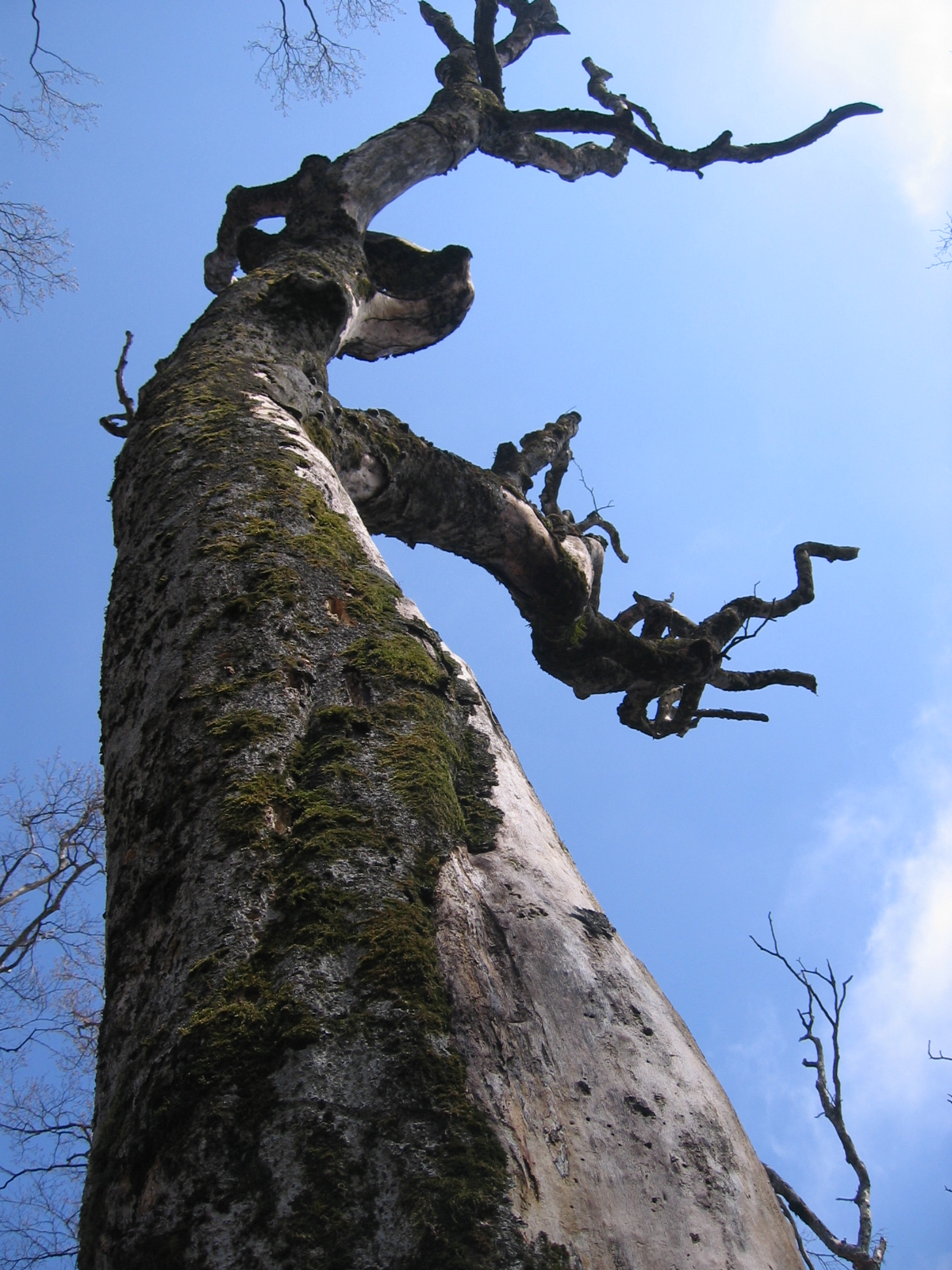 ブナの立枯れ 丹沢山地の天王寺尾根にて撮影